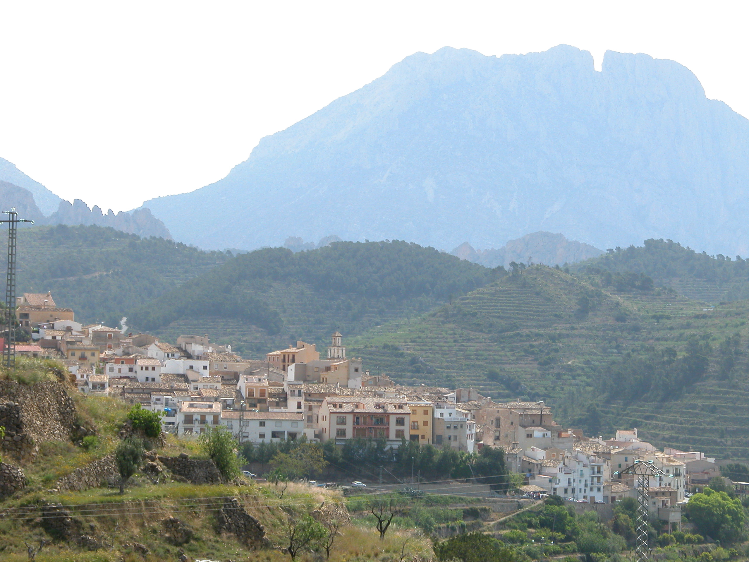 Sella Alicante Spanien